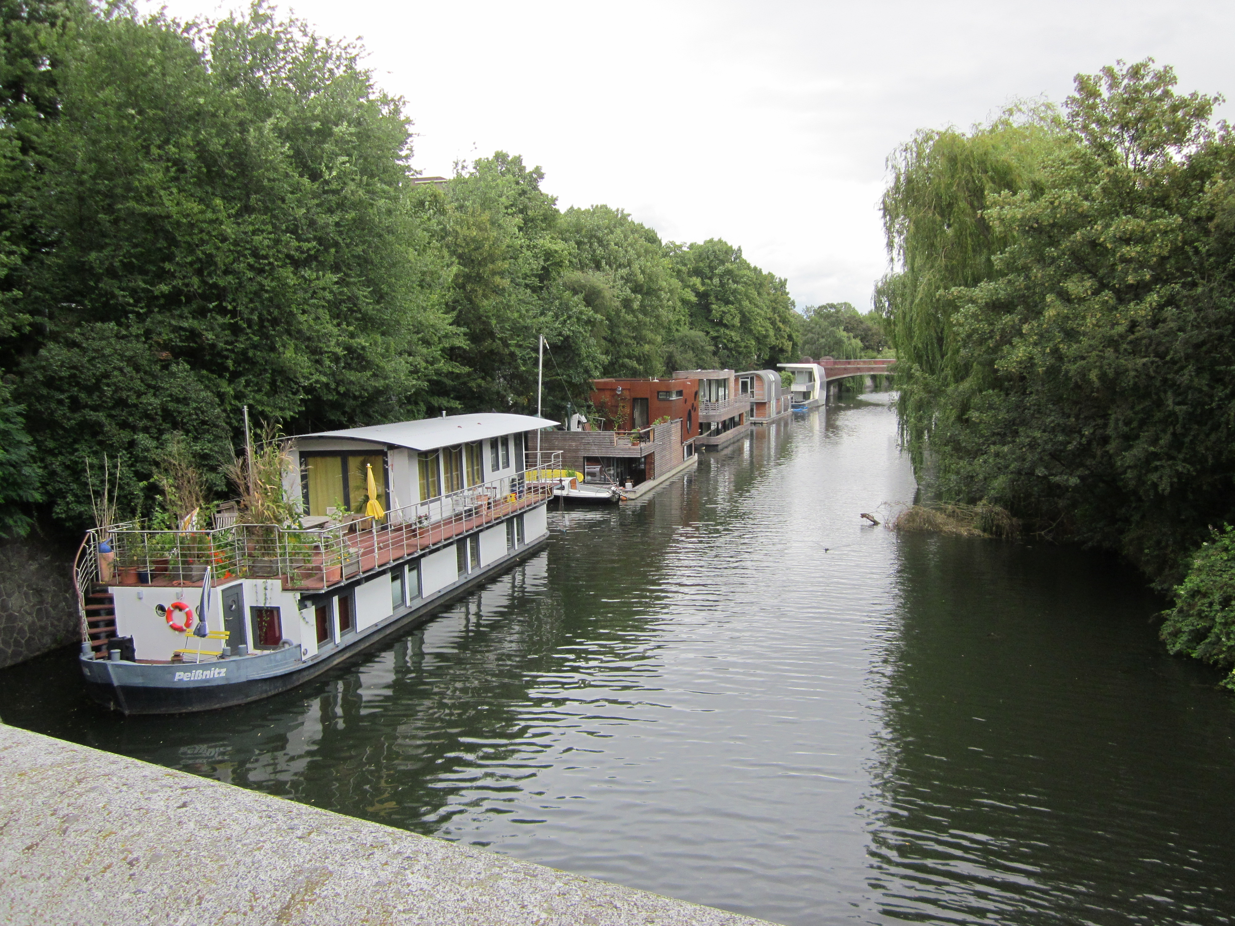 Hausboote am zu Barmbek-Süd gehörenden Nordufer des Eilbekkanals von der Richardstraßenbrücke aus gesehen.